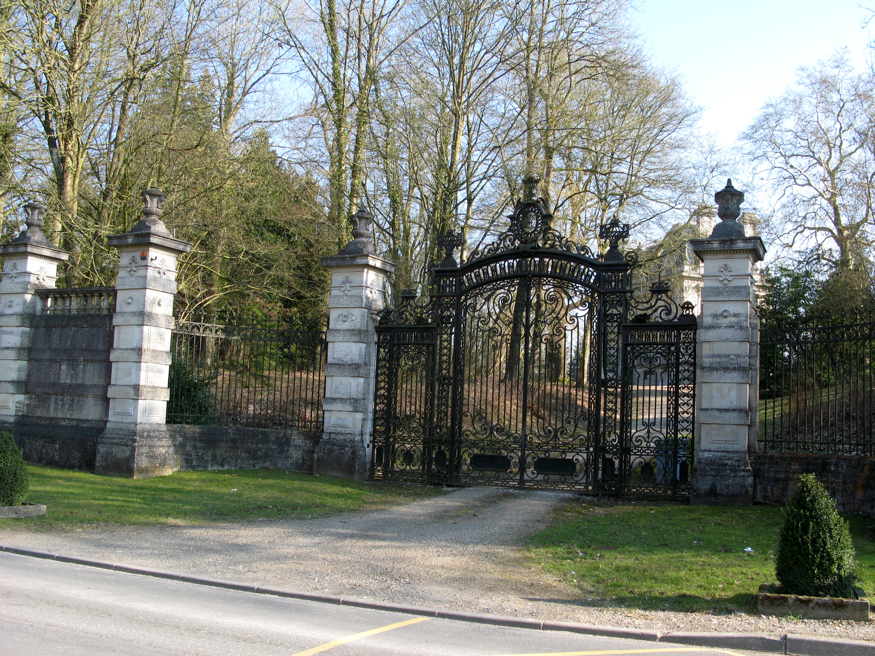 Canaples (Somme, France) - L'entrée du château. .